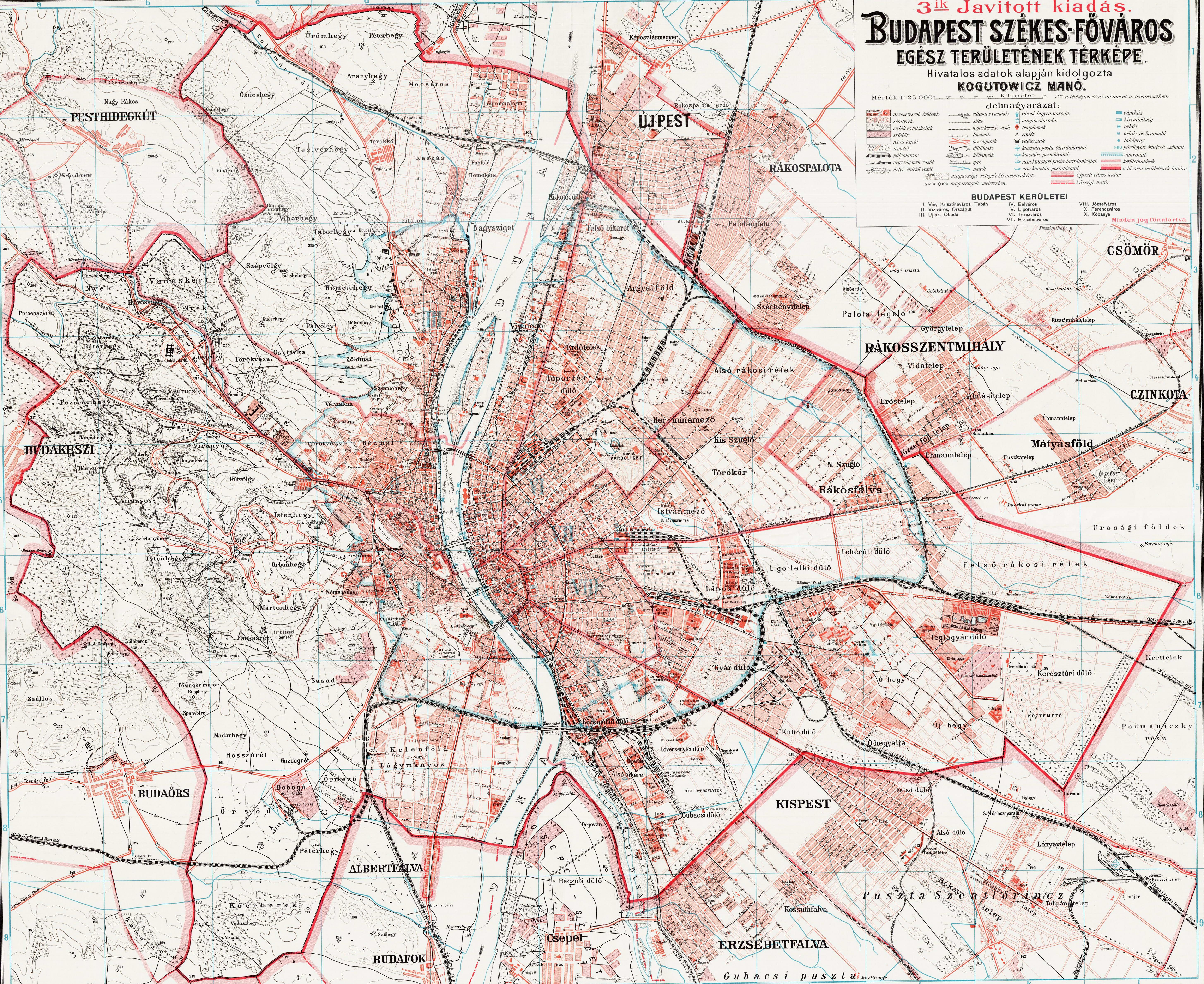 Budapest székes-főváros egész területének térképe Kogutovicz Manó, 1908